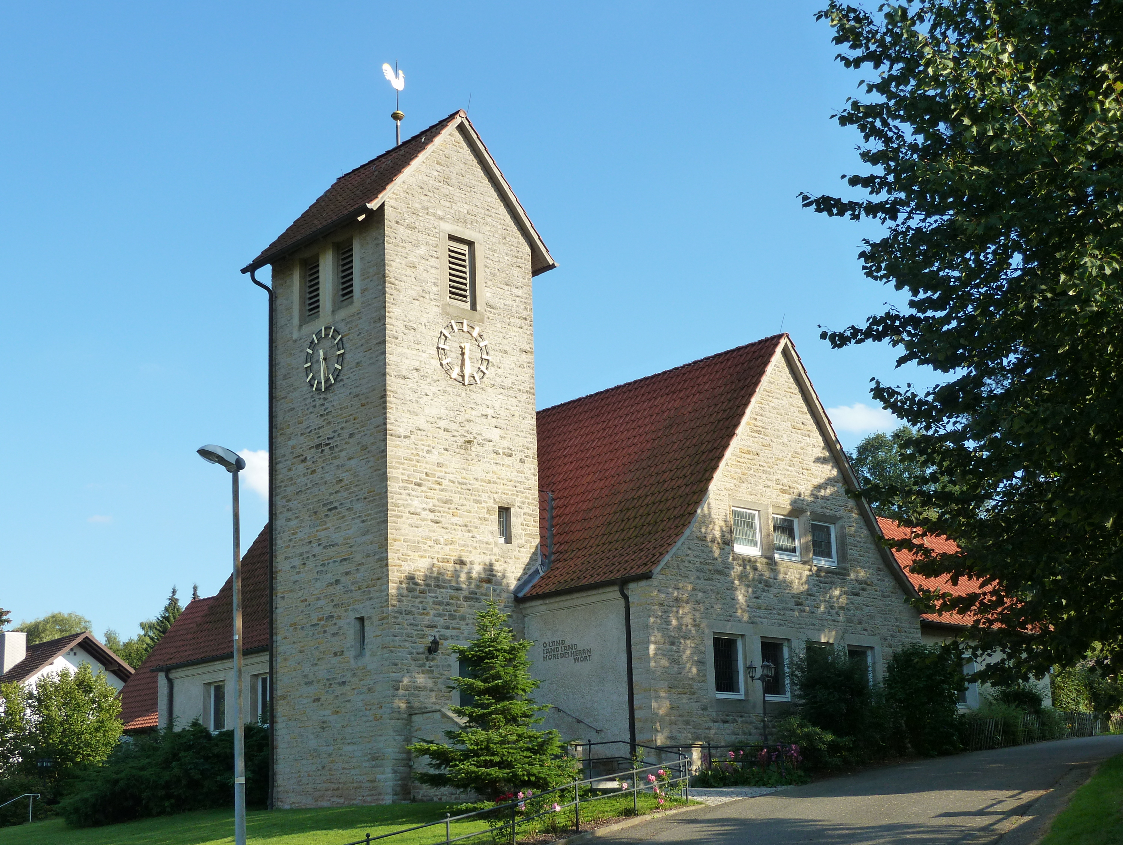 Evangelisch-lutherische Heilig-Geist-Kirche in Hilkerode, Stadt Duderstadt, südniedersächsisches Eichsfeld. Erbaut 1959